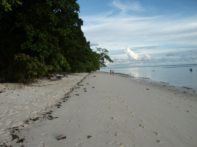 Turtle Patch, Sipadan.